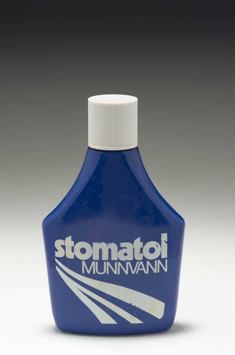 Stomatol munnvann.